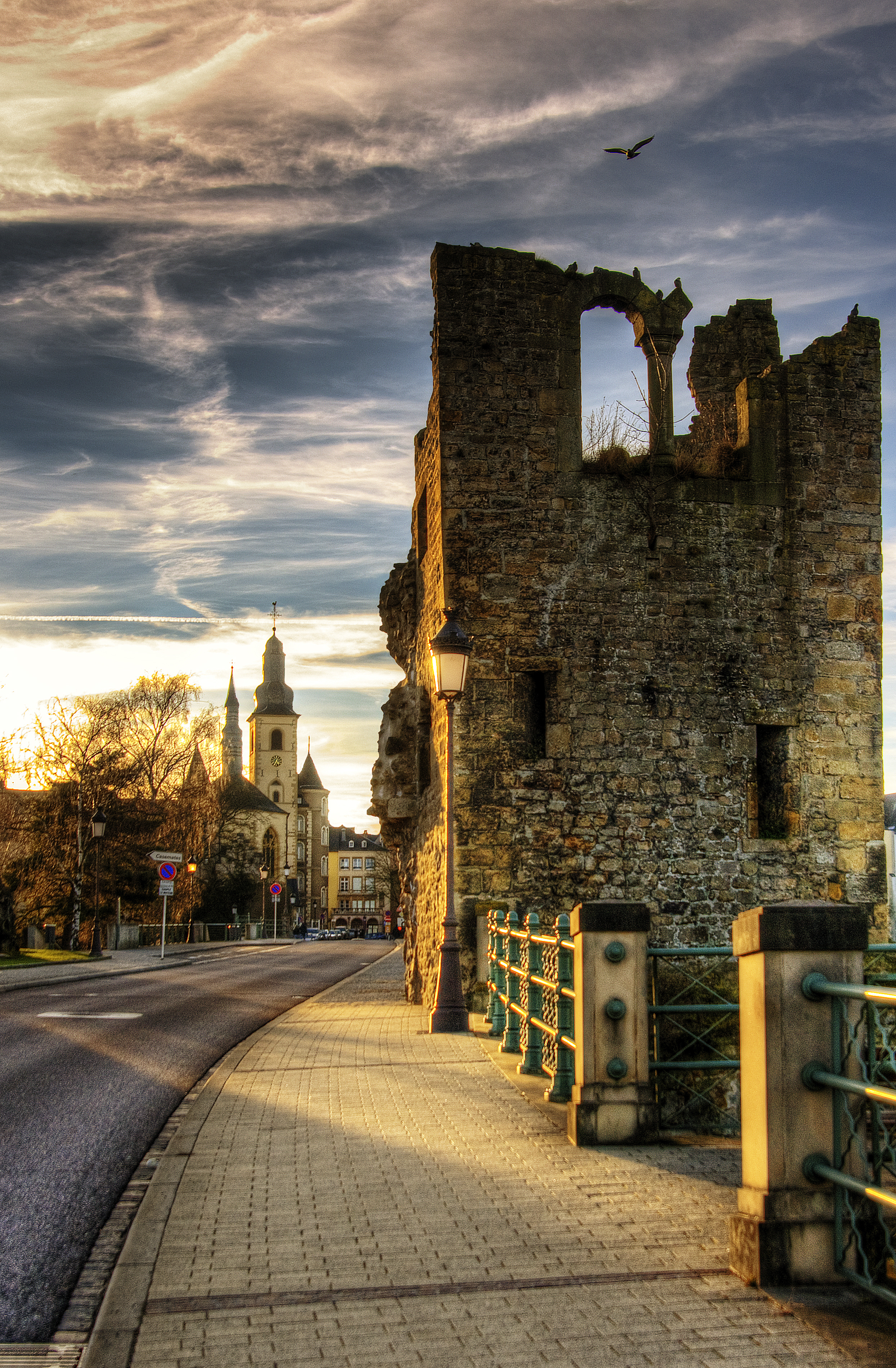 Den Huelen Zant, mat am Hannergrond d'Méchelskierch